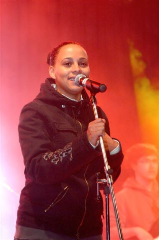 Tina